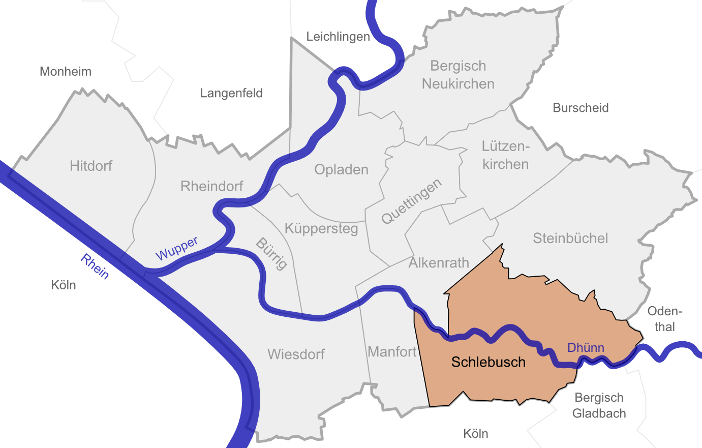 Lage von Schlebusch in Leverkusen